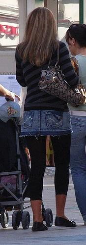 femme en minijupe et leggings